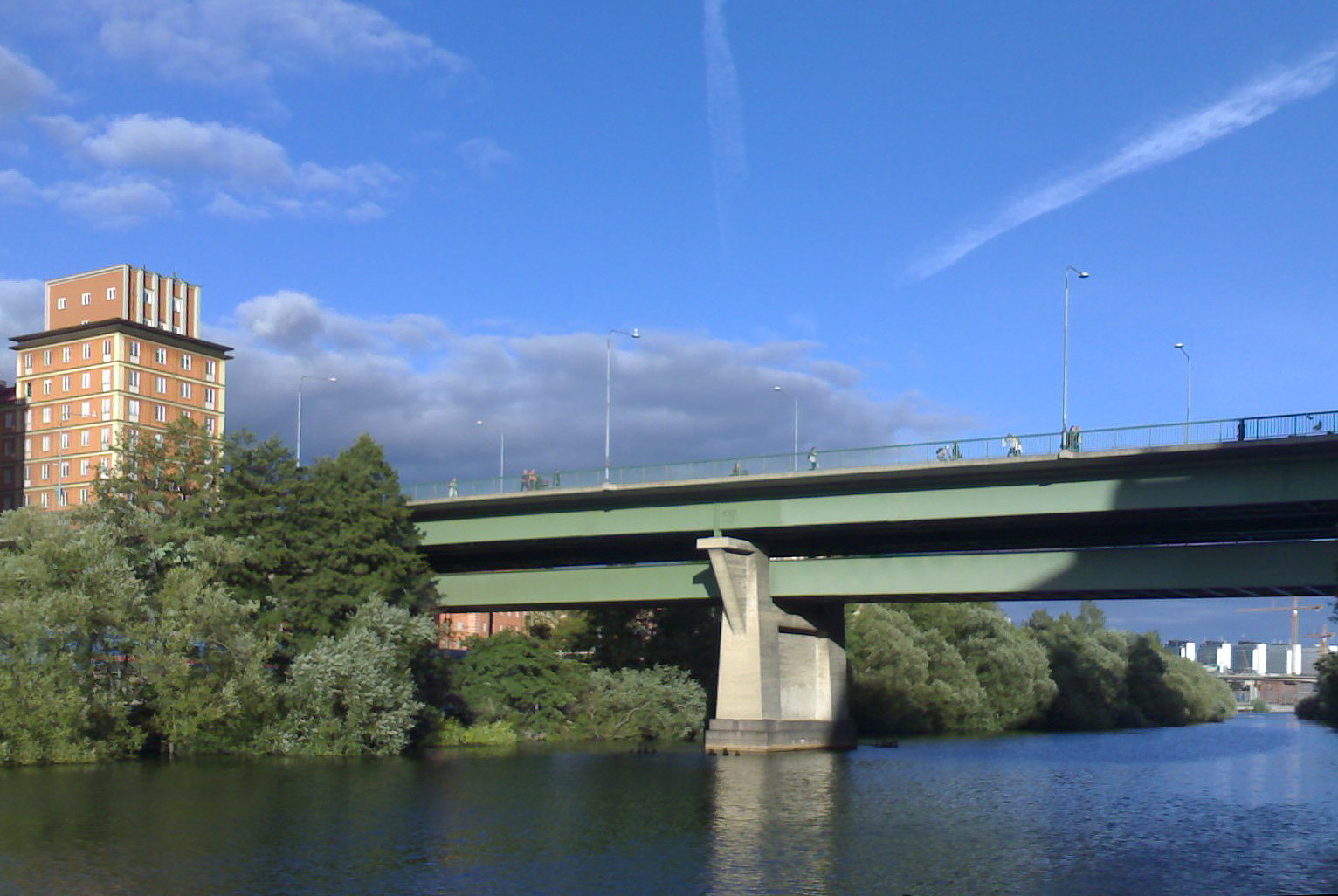 Sankt Eriksbron, Stockholm. 'cameraphone upload by ShoZu'.